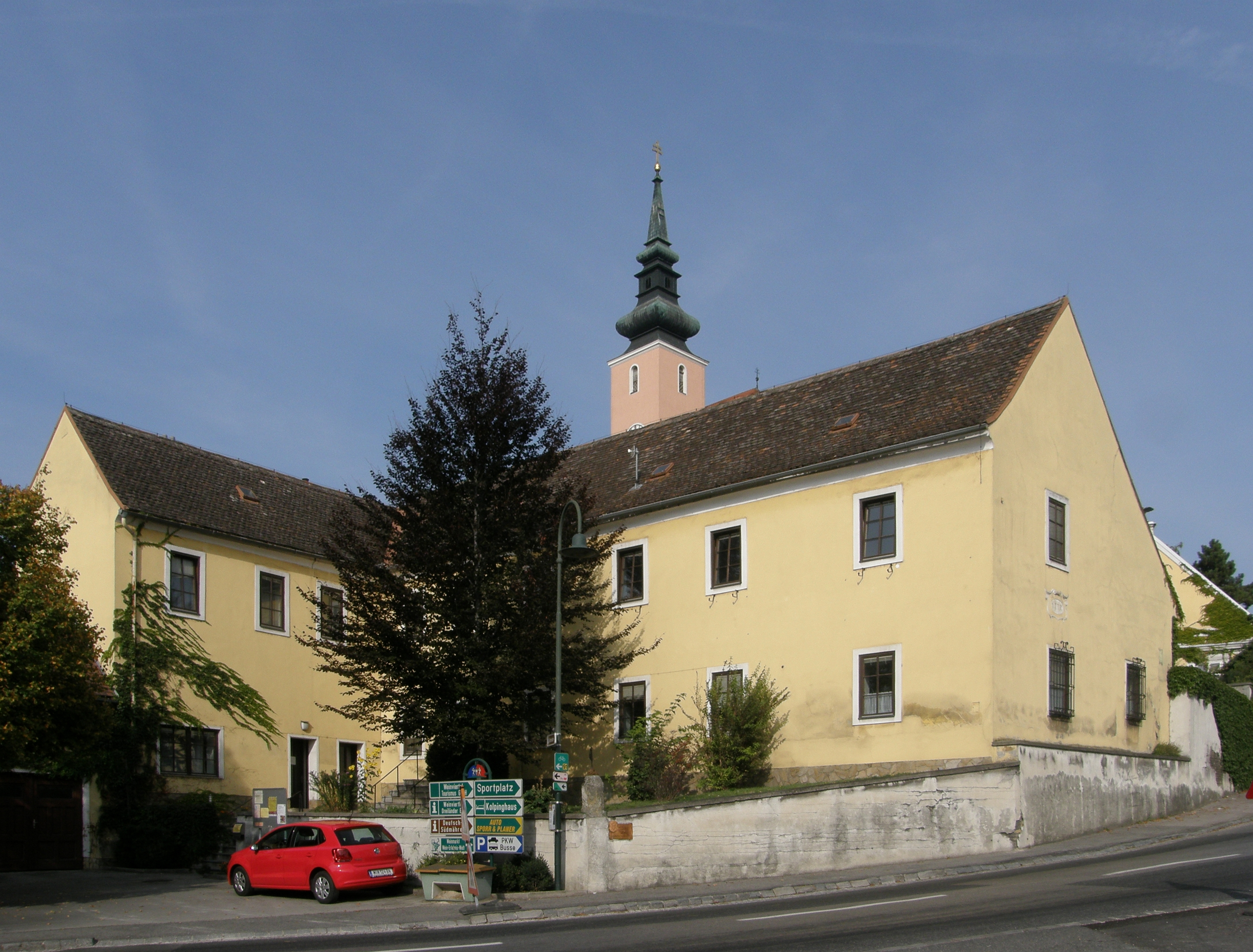 Pfarrhof